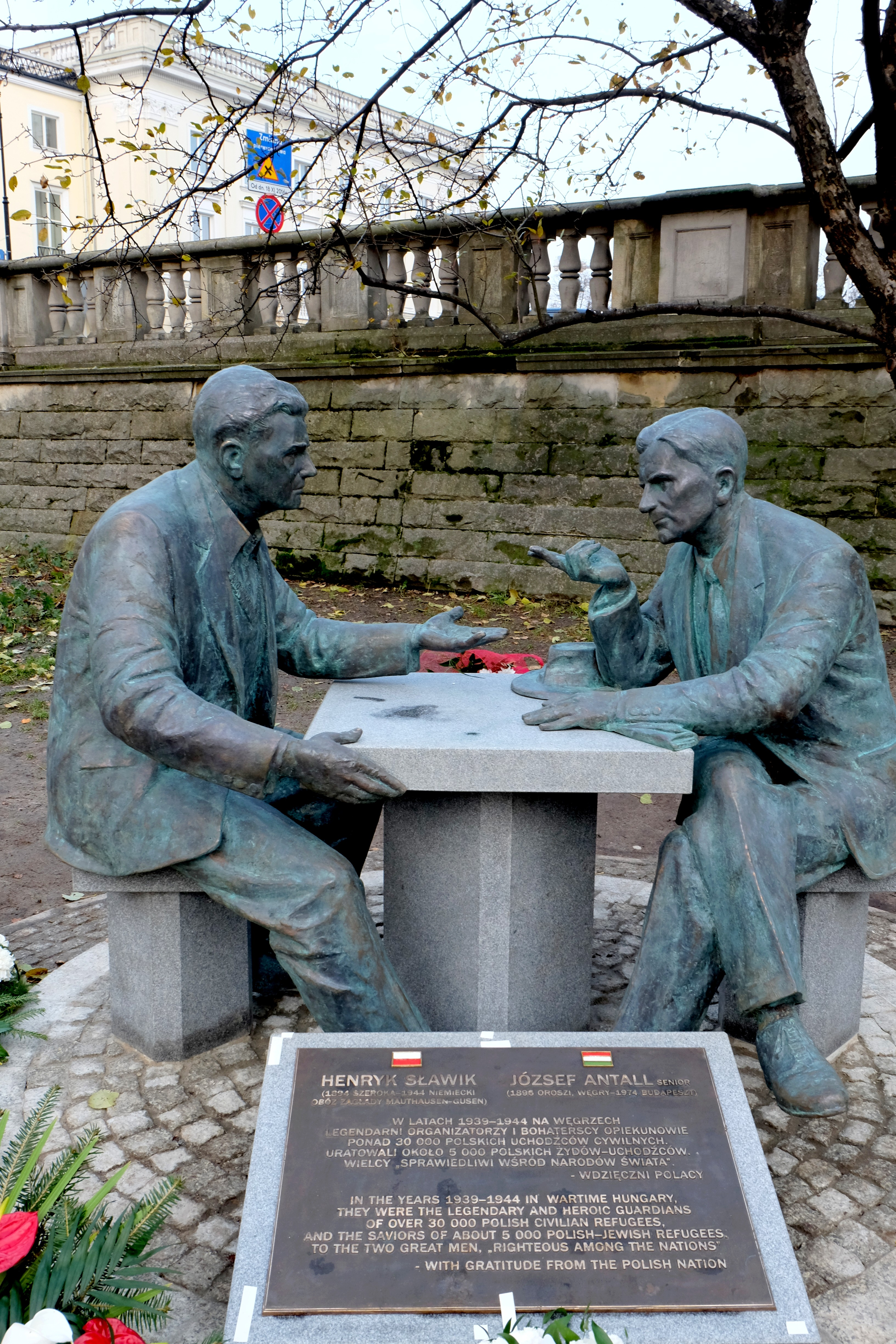 Pomnik Henryka Sławika i Józsefa Antalla w Dolinie Szwajcarskiej, w Warszawie tuż po odsłonięciu